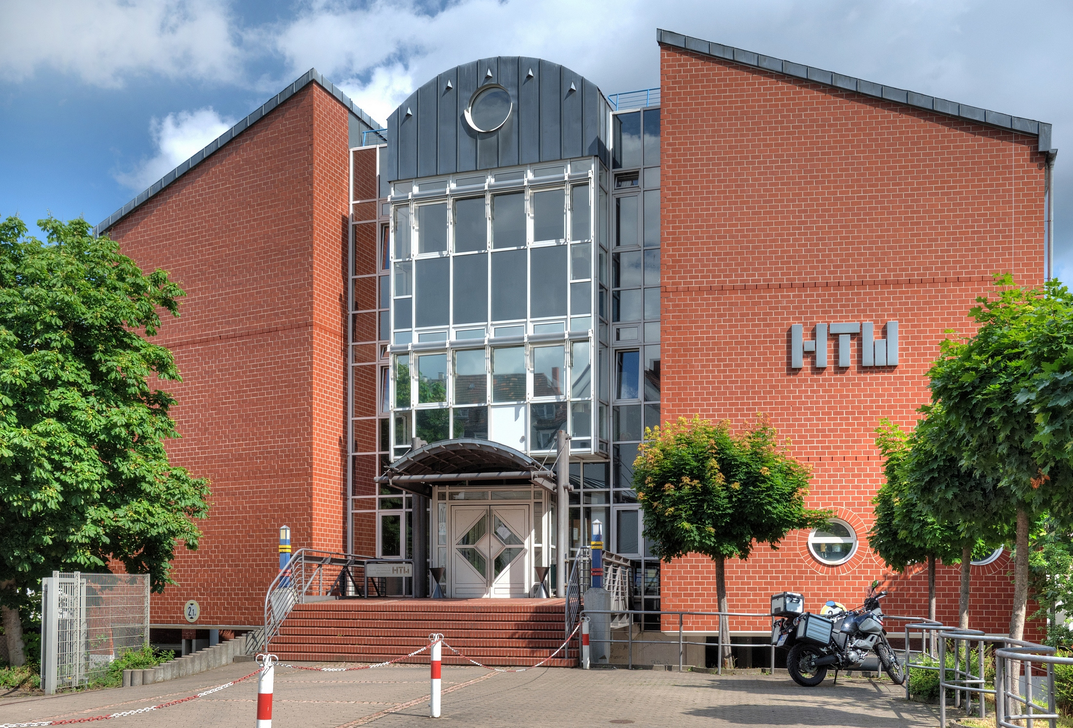 Gebäude 8 des Campus der HTW d. Saarlandes in der Goebenstraße, Alt-Saarbrücken.